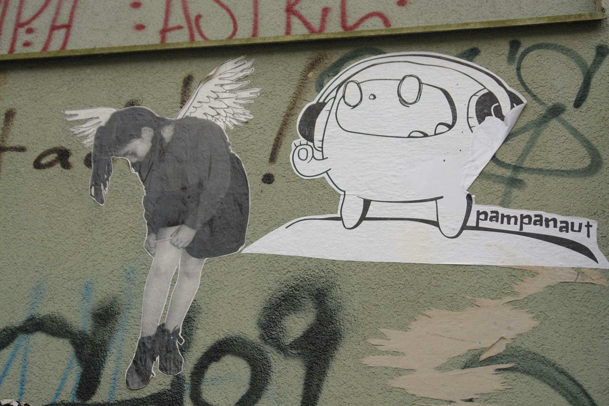 Papierarbeit in der Dresdner Neustadt